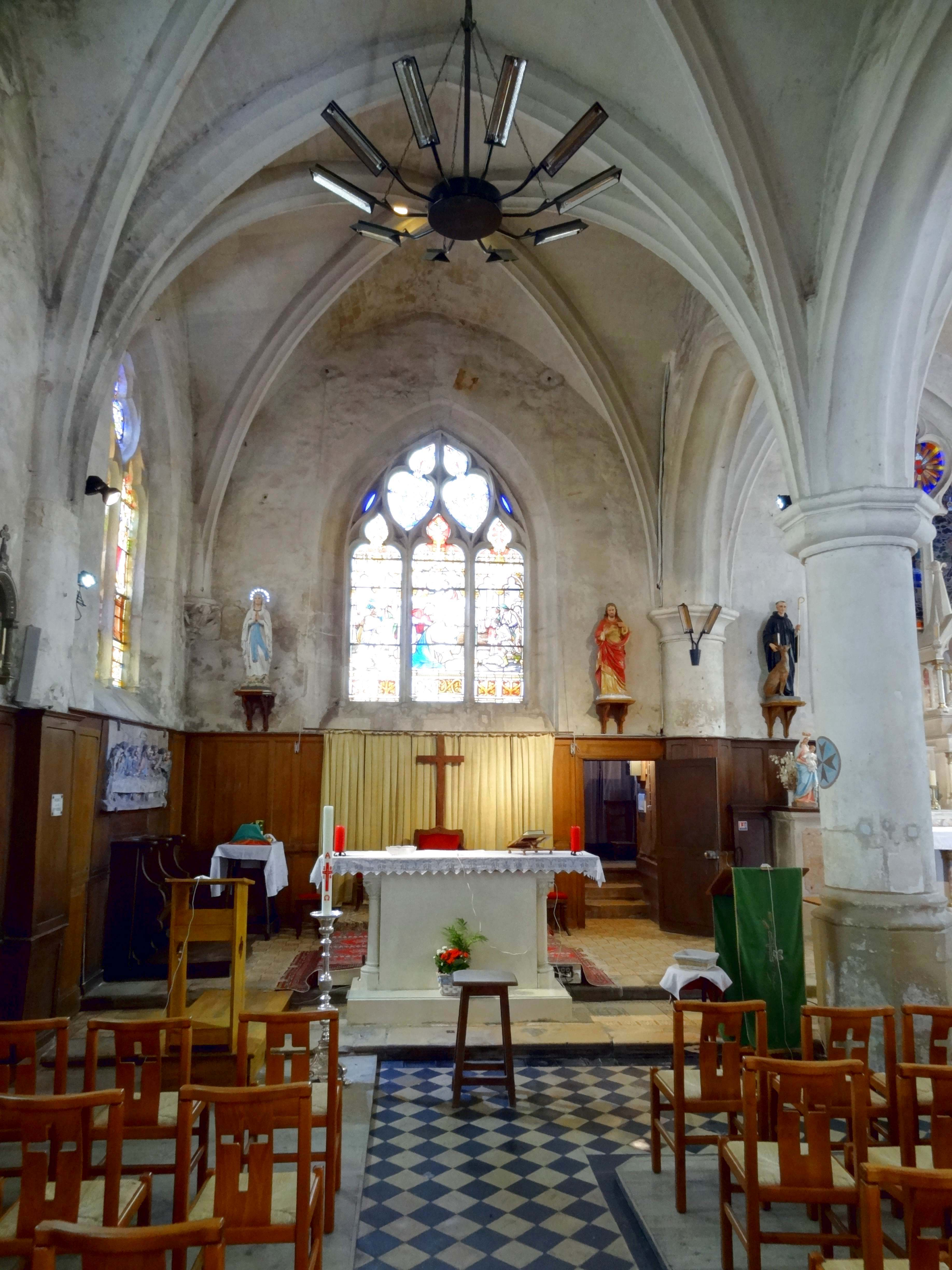 Intérieur de l'église - voir titre.